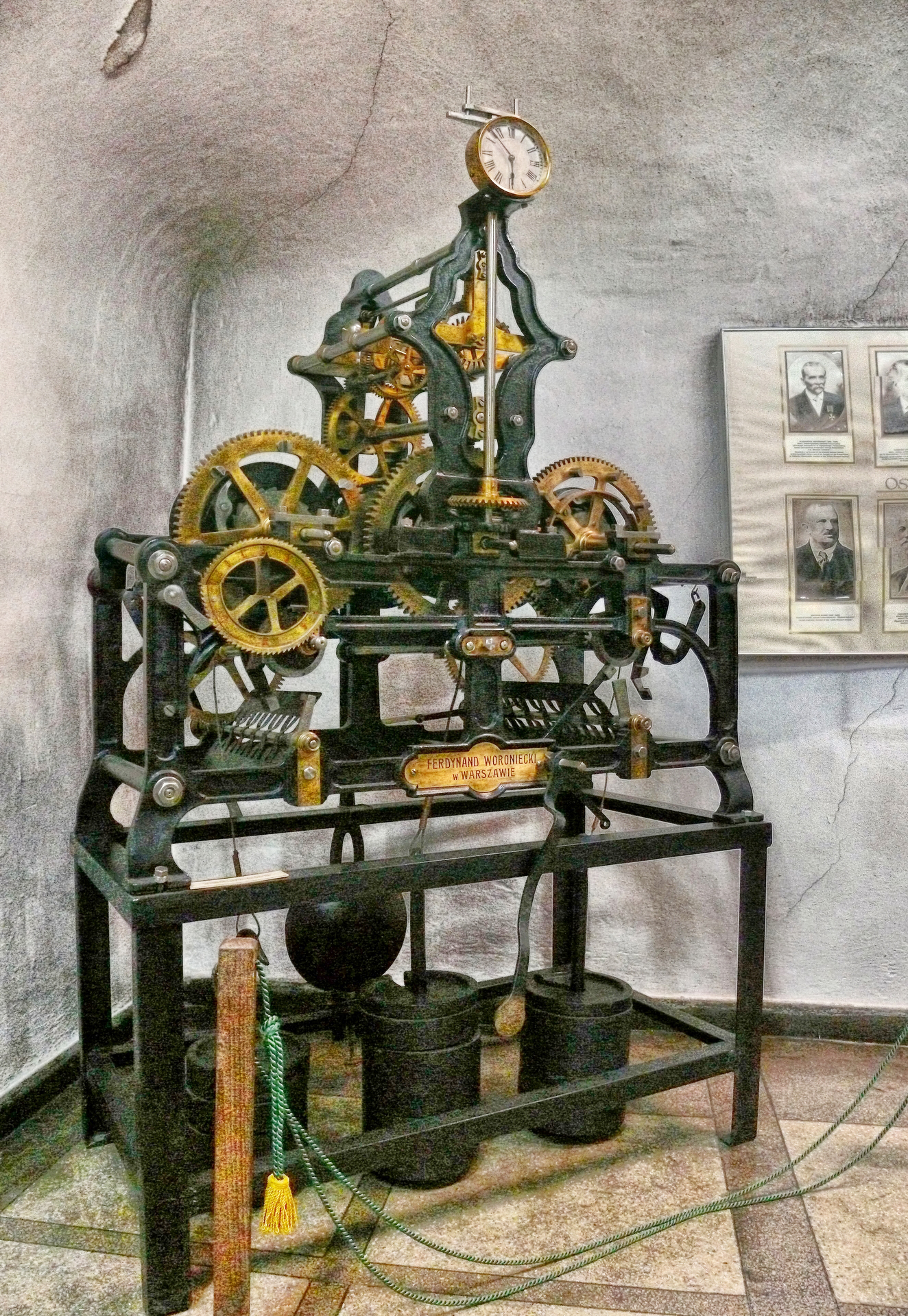 mechanizm zegara wieżowego, znajdujący się w zbiorach Muzeum Miasta Lublina.